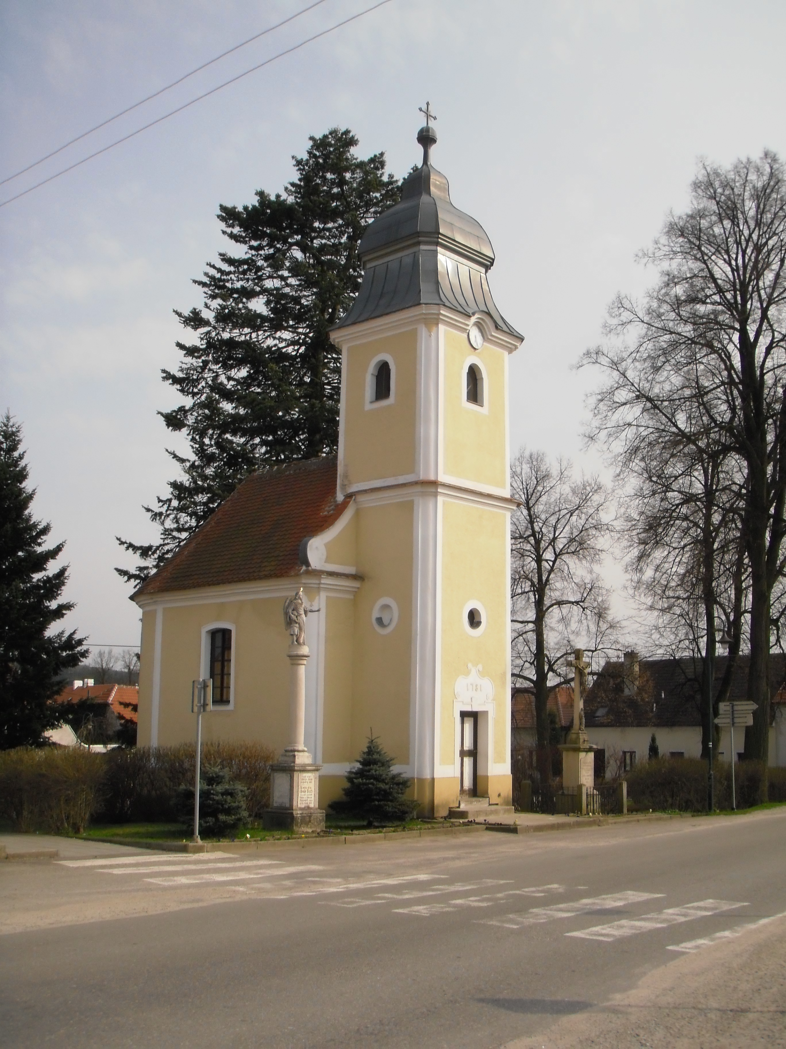 Preserved village Desov (CZ)